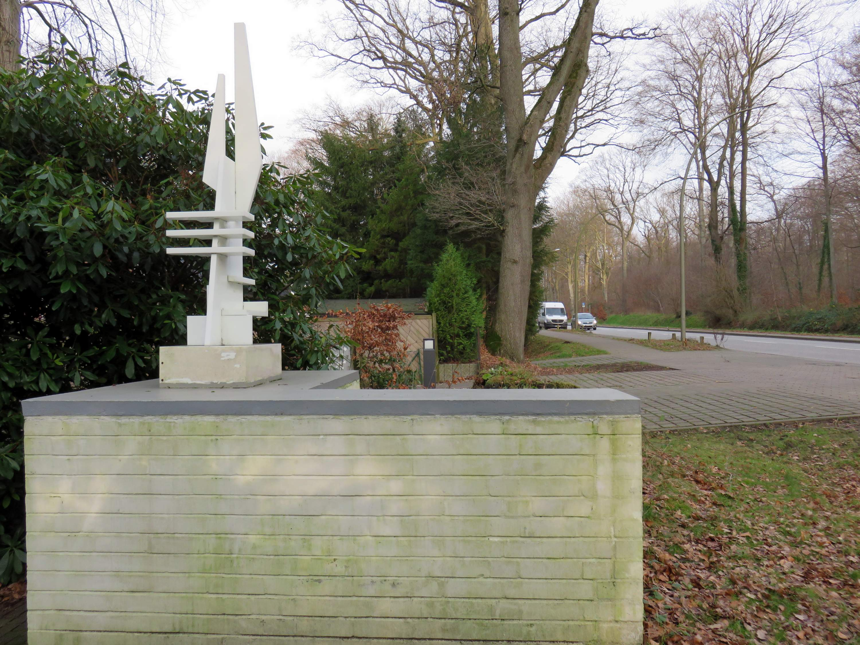 Plexi-Objekt des Architekten und bildenden Künstlers Bernhard Dexel (1919 – 2000) von 1982 an der Einfahrt zu seinem (ehemaligen) Bungalow Farmsener Landstraße 95c in Hamburg-Volksdorf.